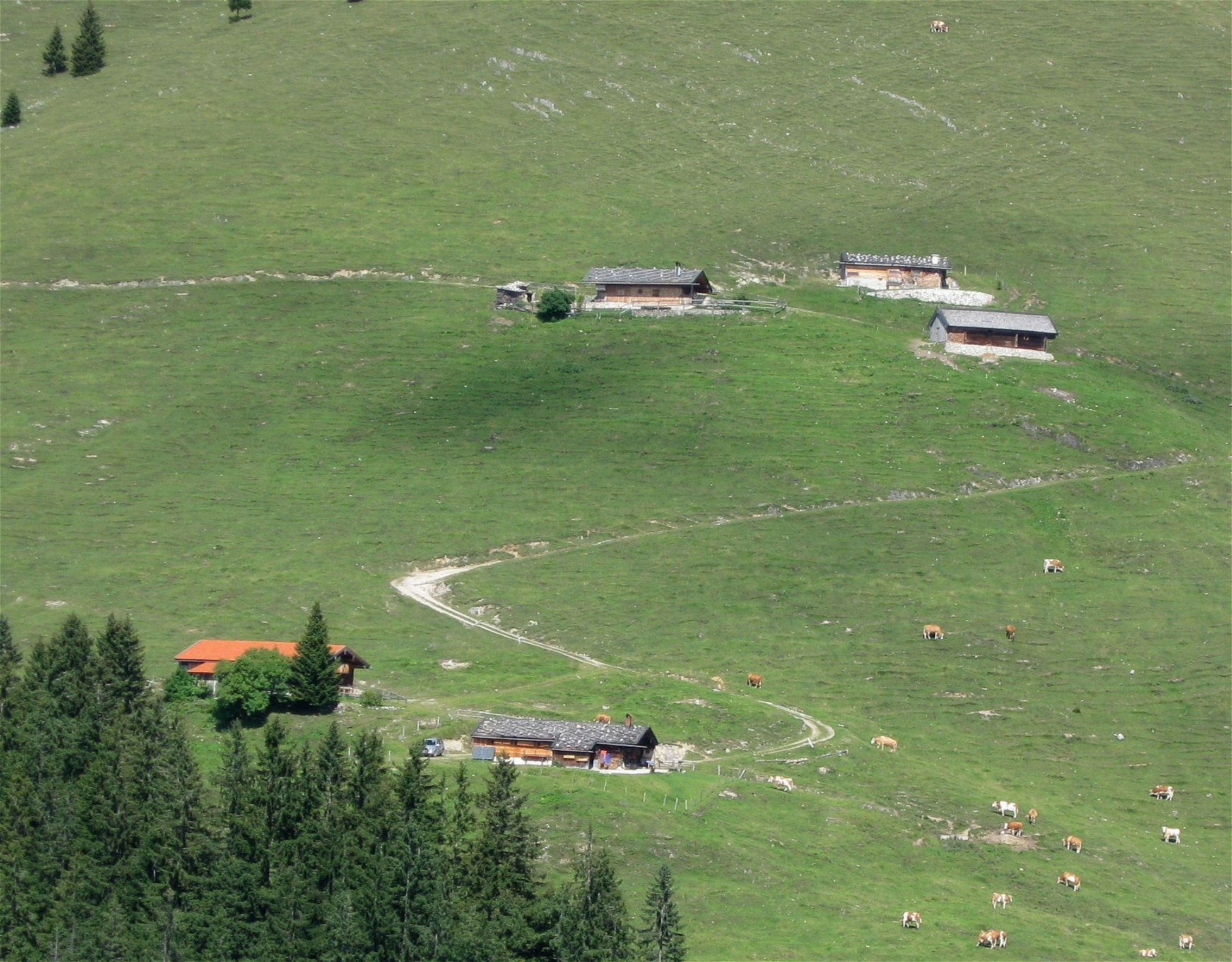 Steilnalm. Alm, sog. Steilenalm, drei Almgebäude, Holzbau auf Steinsockel mit Satteldach und Sterntür, um 1825; Holzbau auf Steinsockel mit flachem Legschindeldach, 1780; verschindelter Holzbau auf Steinsockel mit Flachsatteldach, um 1825.